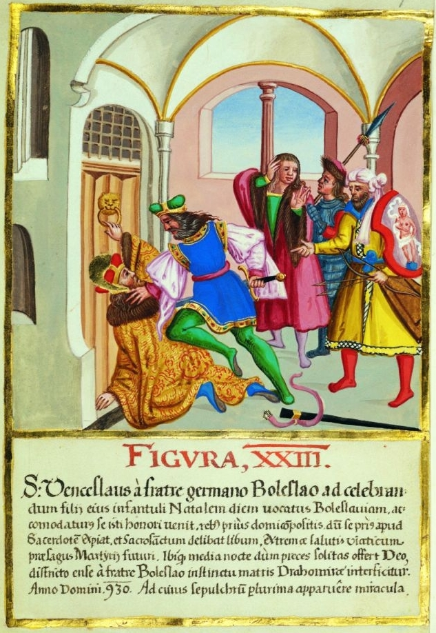 Výjev z knihy Historické obrazy života a umučení svatého Václava, knížete českého